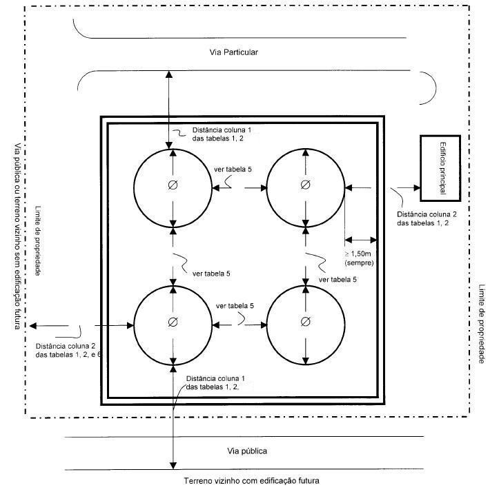 Imagem complementar das tabelas